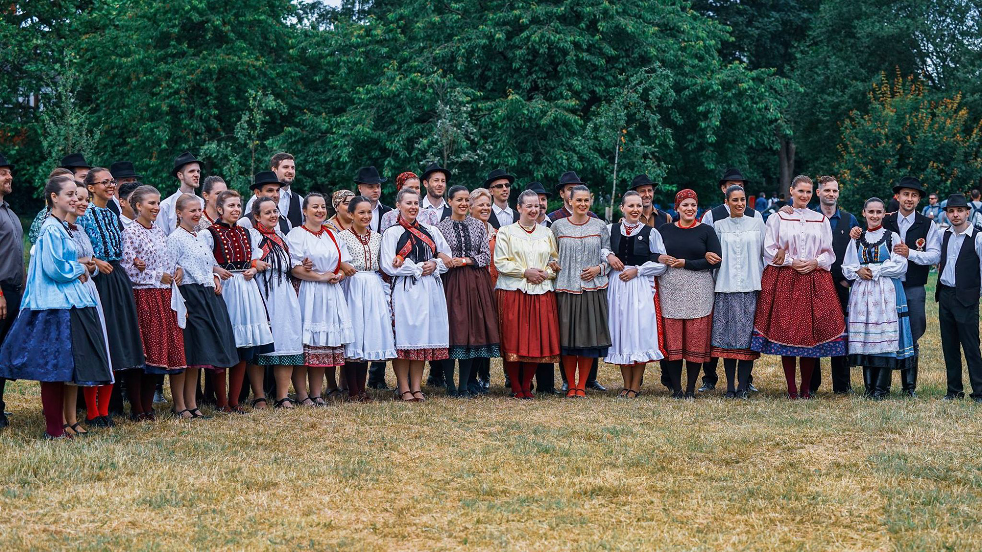 Néptáncosok a Magyar Kultúra Napján. London 2018. Készítette: Pillinger-Kerepesi Zoltán Szabadon terjeszthető / FREE TO USE